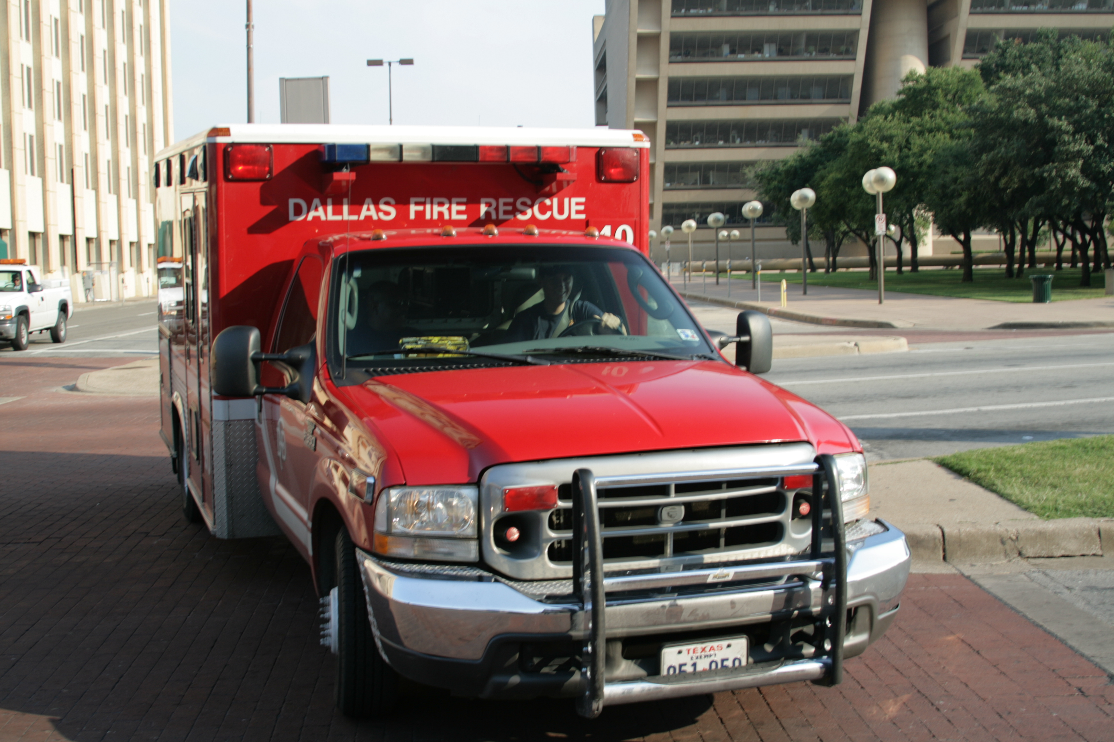 Ford F-350 - Dallas Fire Rescue